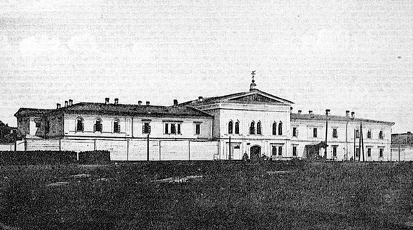 г. Иркутск. Рабочее предместье Иркутская городская тюрьма.